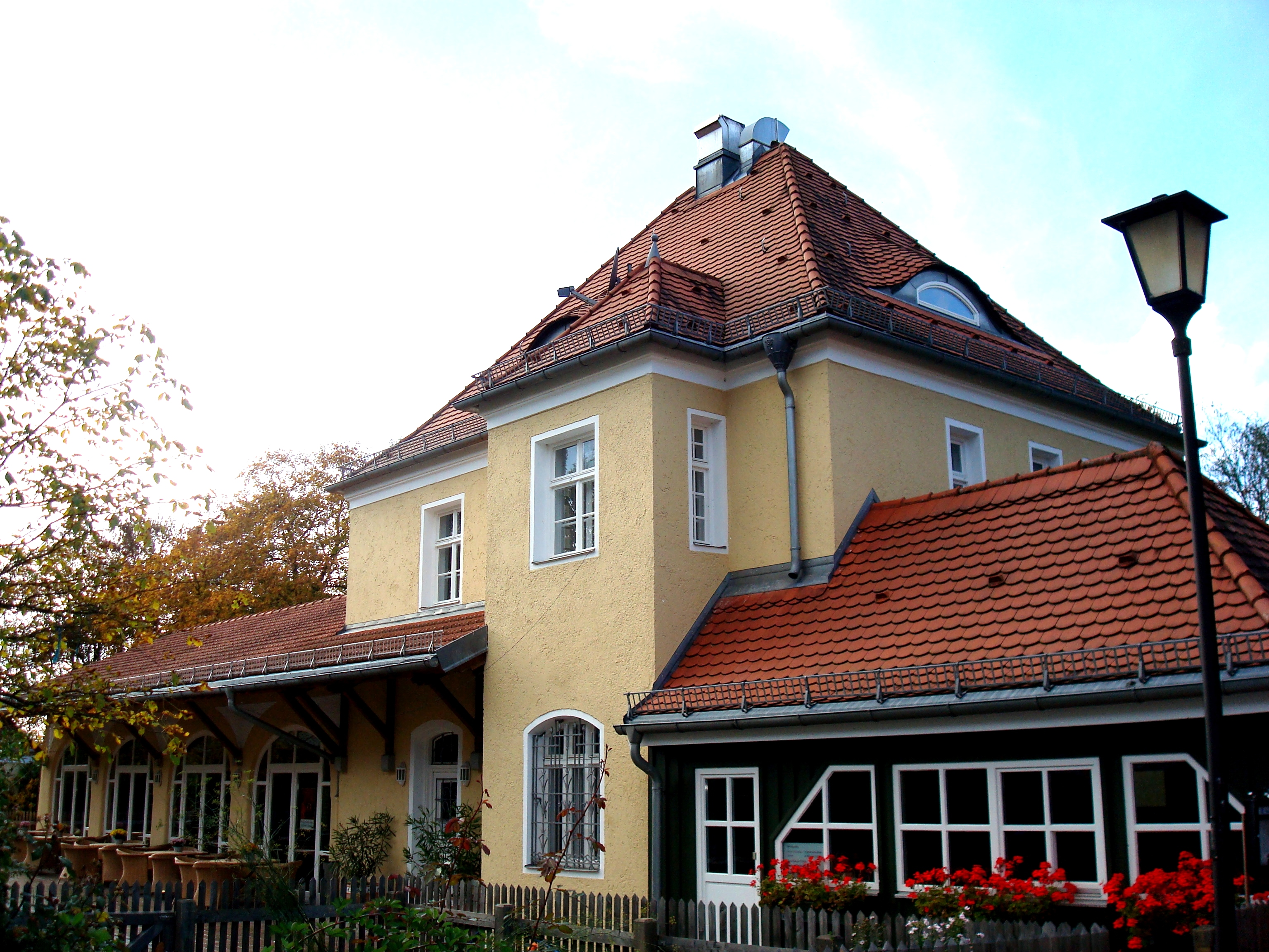 Wörthsee, OT Steinebach, Bahnhofstraße 2-4, Bahnhofsgebäude